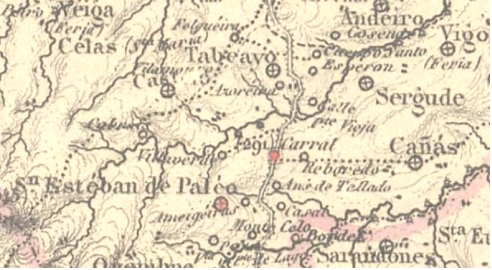 Identificación de Orto, Santo Estevo de Paleo, Carral e Ans de Tellado na cartografía histórica do ano 1865 (Coello, 1865).